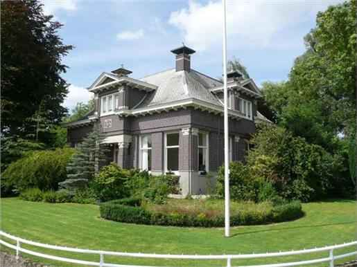 Ter vervanging van huidige gebruikte foto, waar de gebruiker van het pand niet gelukkig mee is. Deze bewoner heeft meerdere foto's ter beschikking gesteld als alternatief.